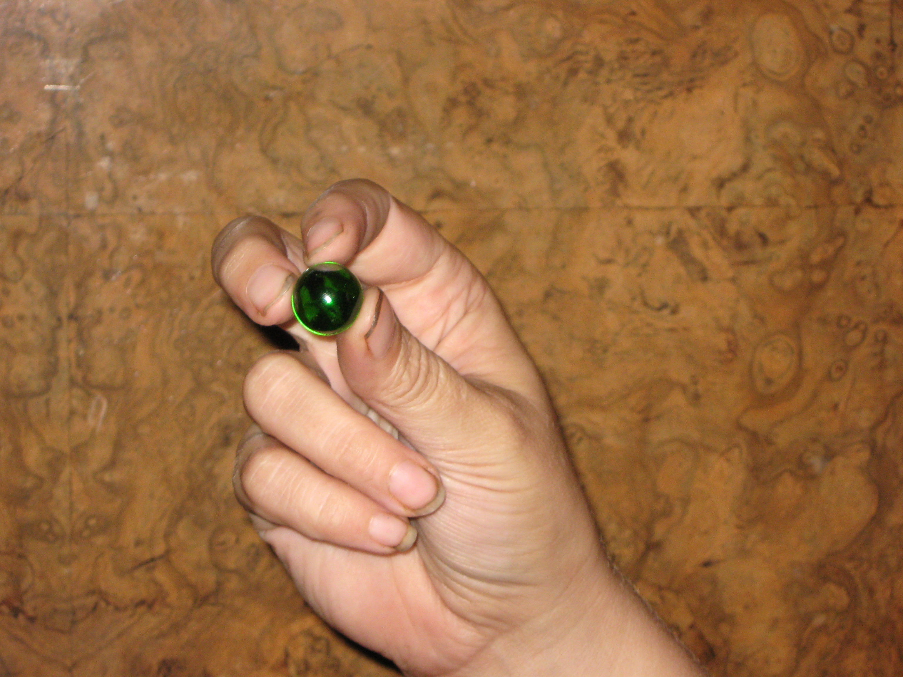 Präzisionsgriff